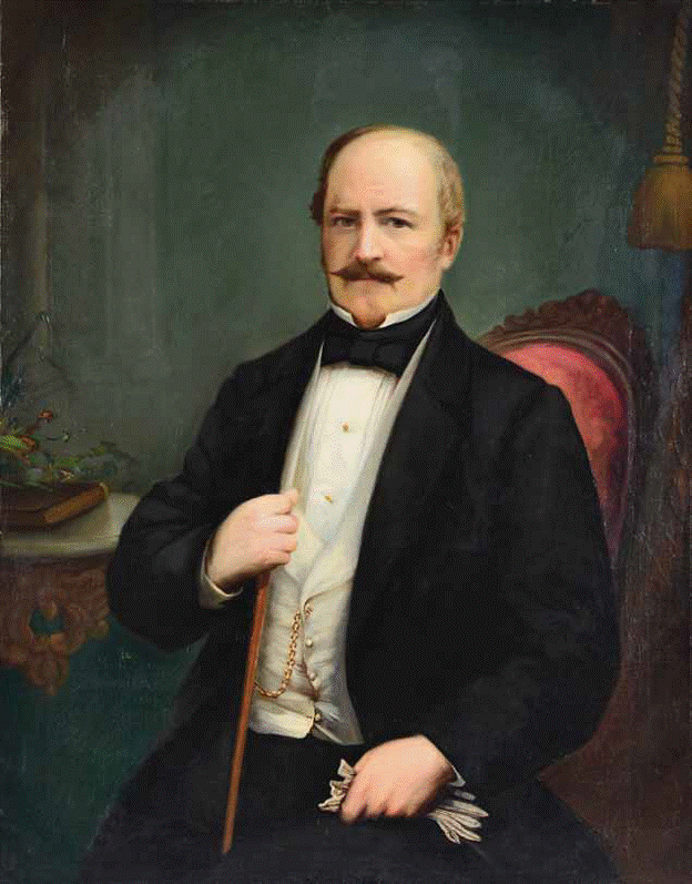 Óleo de Ramón Freire Freire